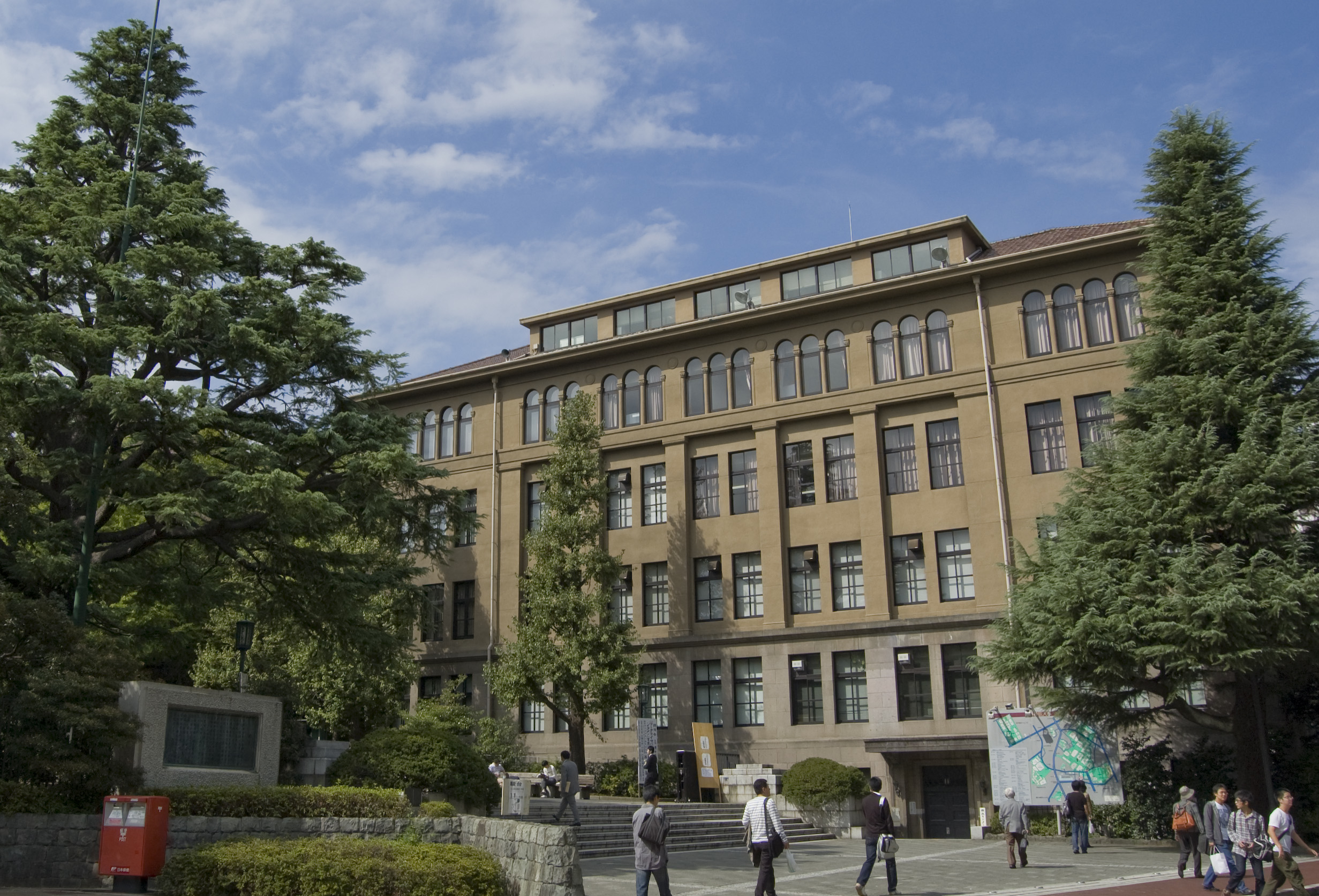 Studentensekretäriat der Waseda-Universität